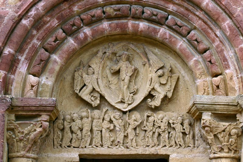 Portail de l'église de Montceaux-l'Étoile